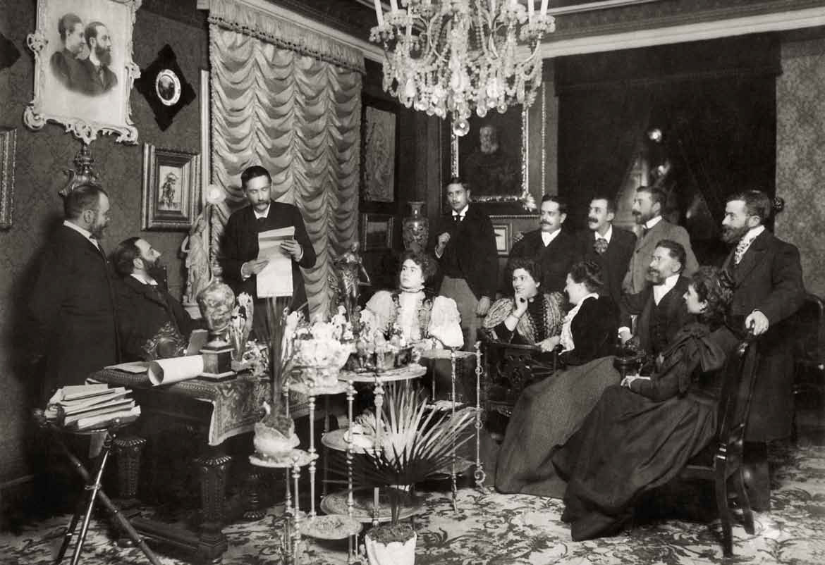 Benito Pérez Galdós leyendo galeradas de su discurso de ingreso en la Academia Española. 6 de febrero de 1897. Colección Sáenz de San Pedro.